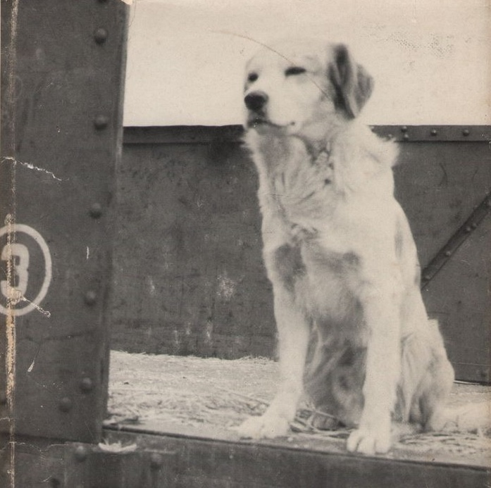 Lampo